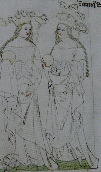 Guta Habsburská a Richenza